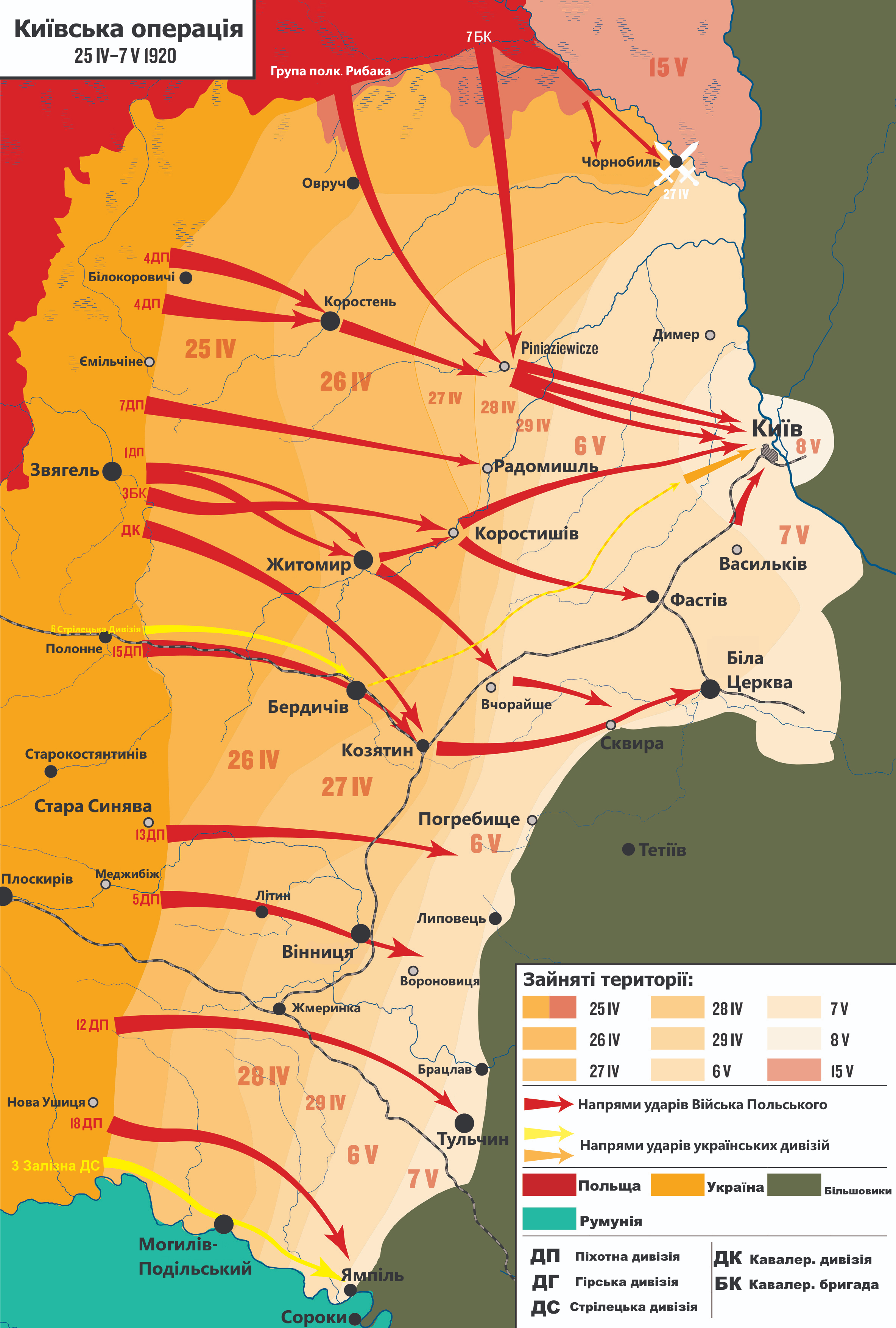 Mapa polsko-ukraińskiej ofensywy przeciwko Armii Czerwonej na Ukrainie w kwietniu-maju 1920 r.